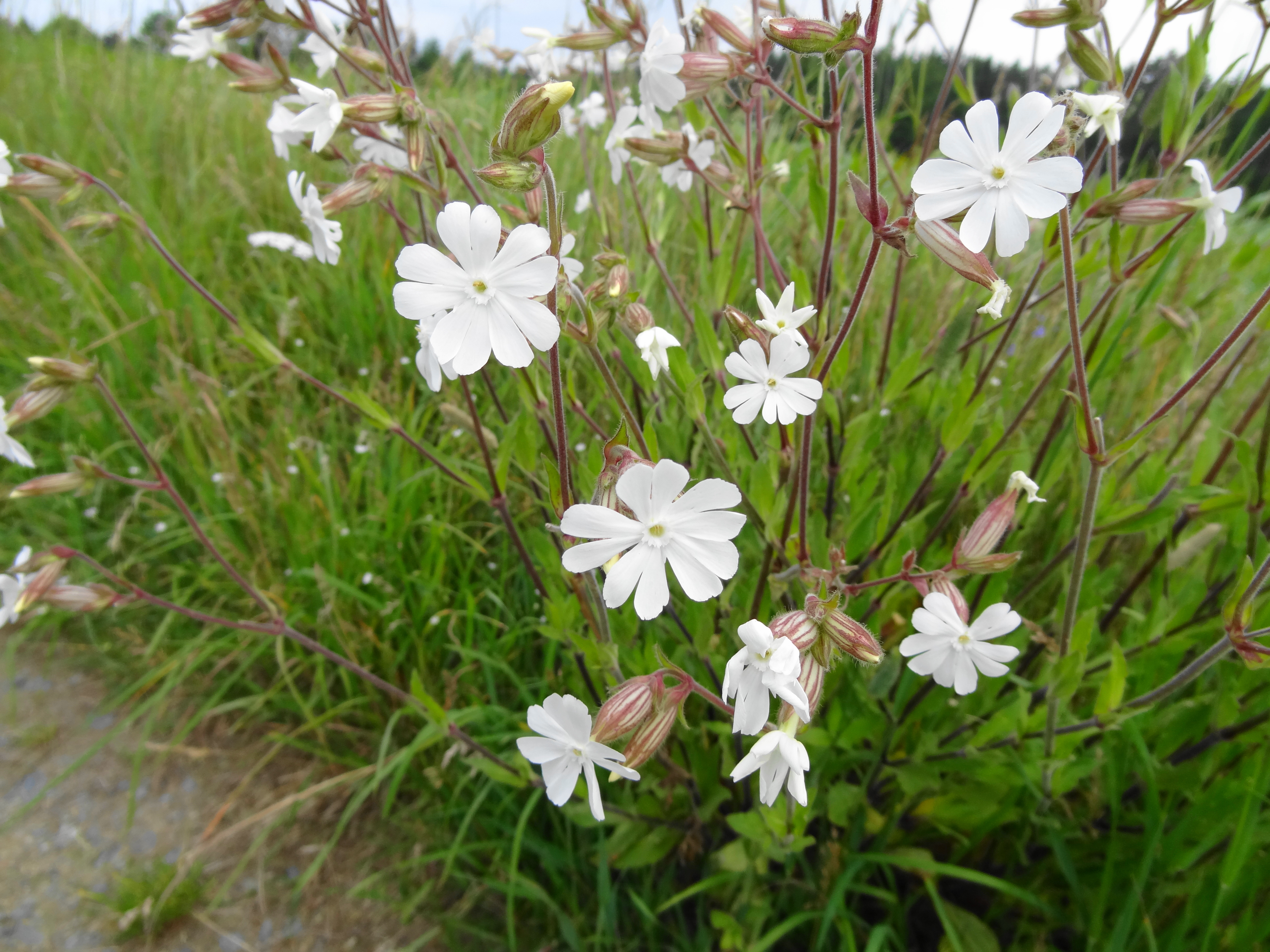 Caryophyllaceae, Weiße Lichtnelke Deutschland, Bayern, Oberfranken, Selbitz Photo: U.Schmidt, 27.VI.2012